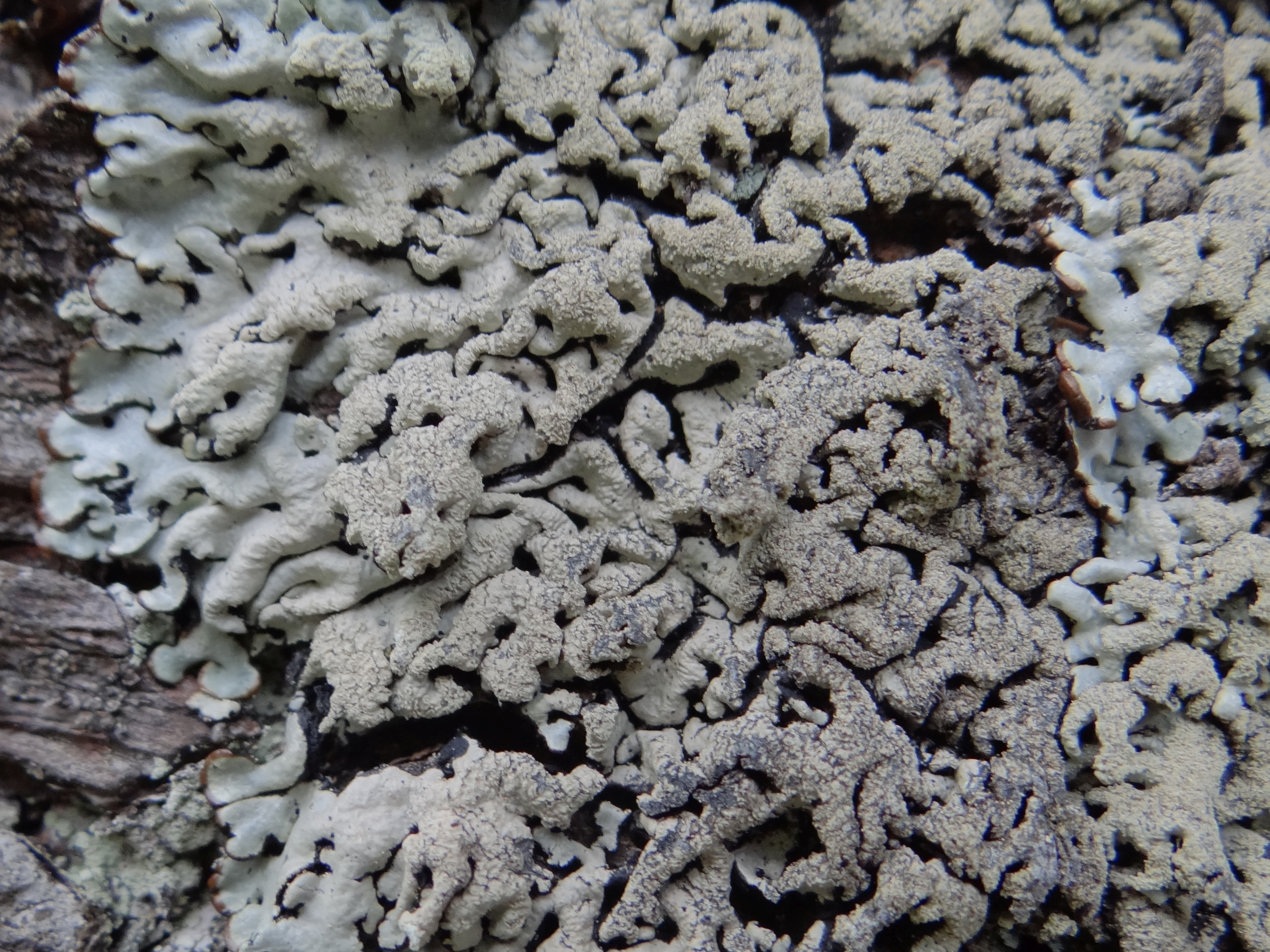 Hypogymnia farinacea (location: Poland, Tatra Mountains, Dolina Bystrej, przy szlaku na Kasprowy Wierch)